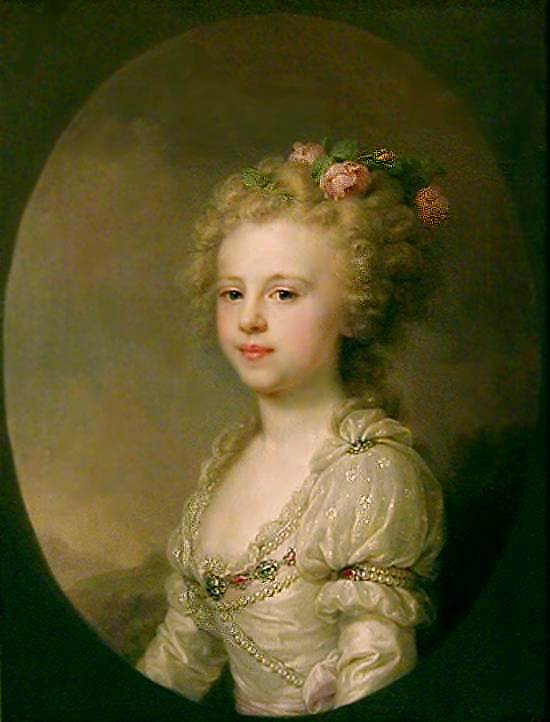 Иоганн Баптист Лампи (1751-1830) Портрет великой княжны Александры Павловны в детстве 1790-е гг., xолст, масло, 70 x 53,5 см Музей-заповедник "ГАТЧИНА"